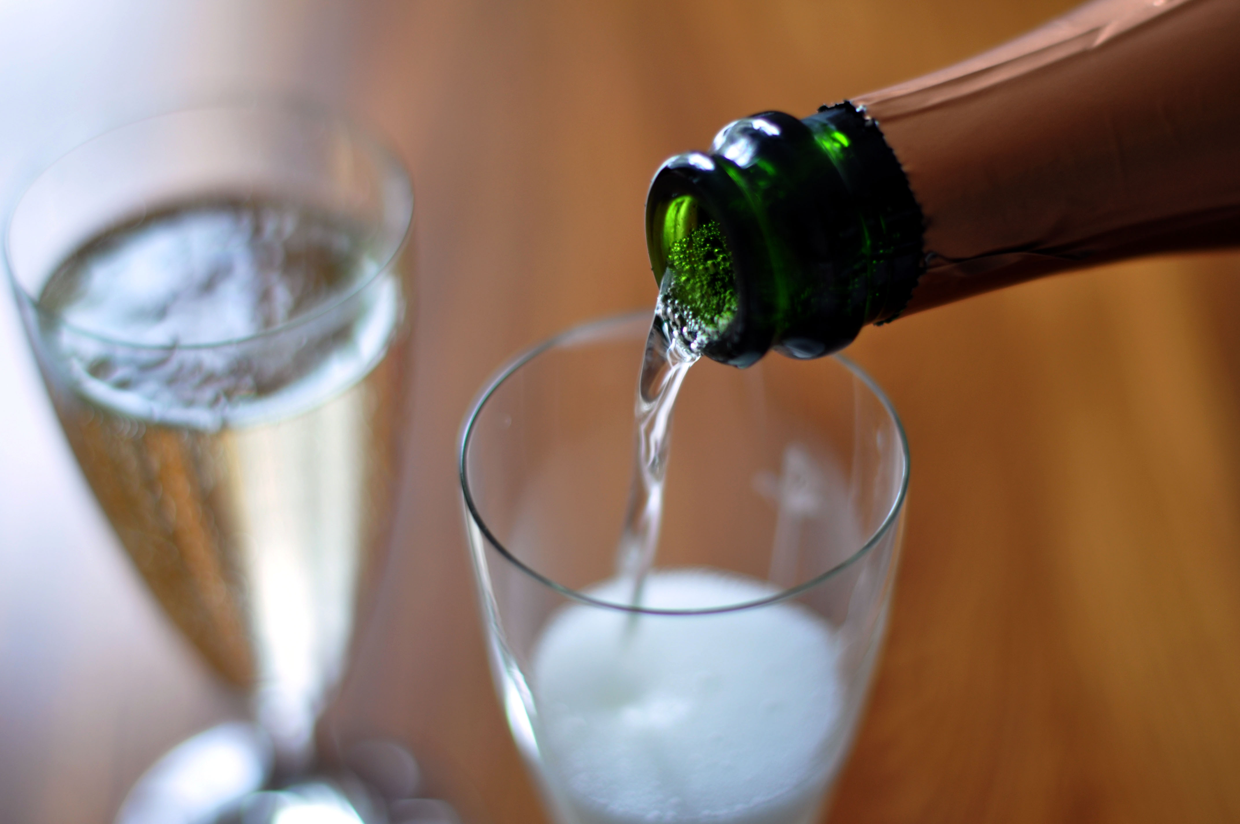 Cava